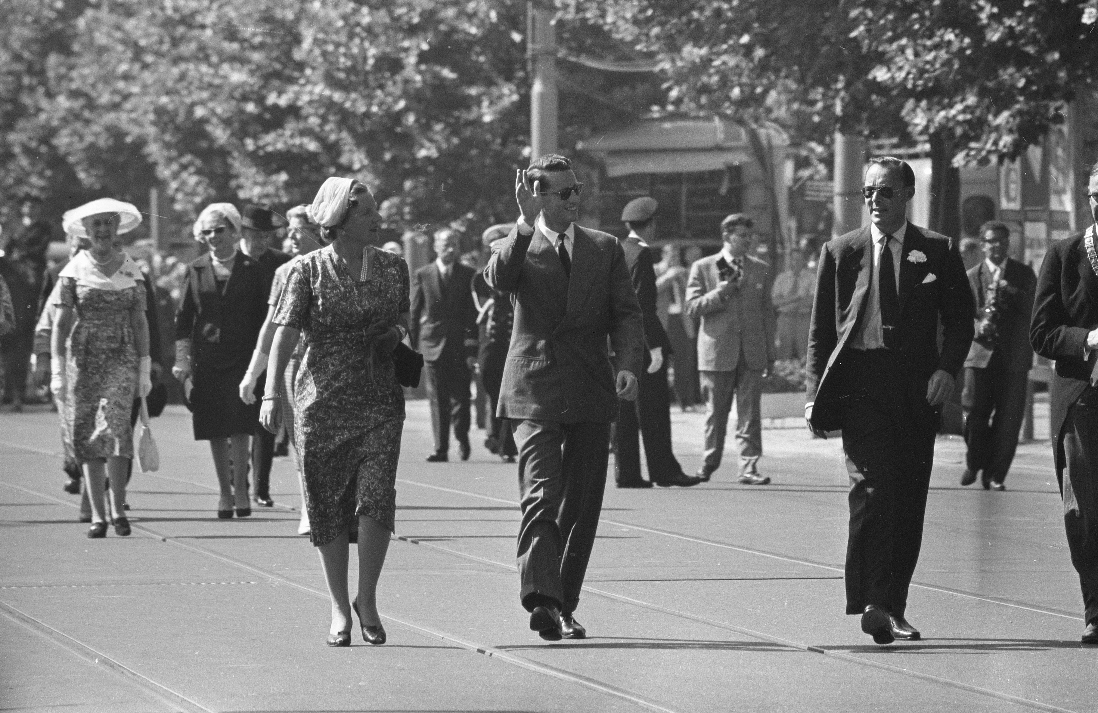 Collectie / Archief : Fotocollectie Anefo Reportage / Serie : Staatsbezoek koning Boudewijn 1959 Beschrijving : Staatsbezoek koning Boudewijn , bezoek Rijksmuseum, aankomst Datum : 8 juli 1959 Locatie : Amsterdam, Noord-Holland Trefwoorden : koninklijk huis, staatsbezoeken, vorsten Persoonsnaam : Bernhard, prins, Boudewijn, koning van België, Juliana, koningin Fotograaf : Fotograaf Onbekend / Anefo Auteursrechthebbende : Nationaal Archief Materiaalsoort : Negatief (zwart/wit) Nummer archiefinventaris : bekijk toegang 2.24.01.05 Bestanddeelnummer : 910-5018